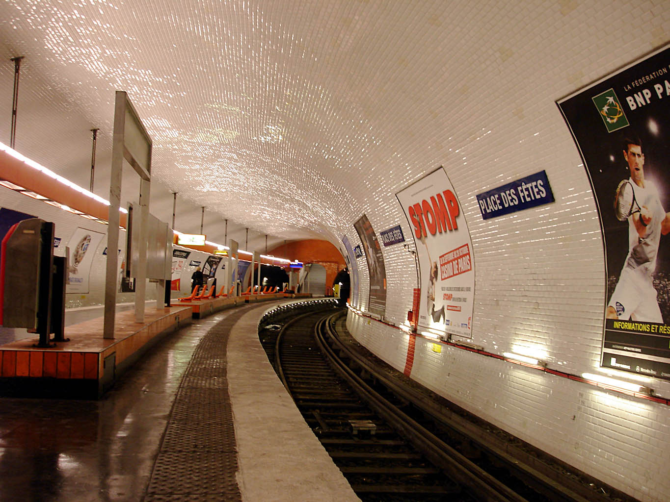 Station Place des Fêtes, de la ligne 7bis du métro de Paris, France.